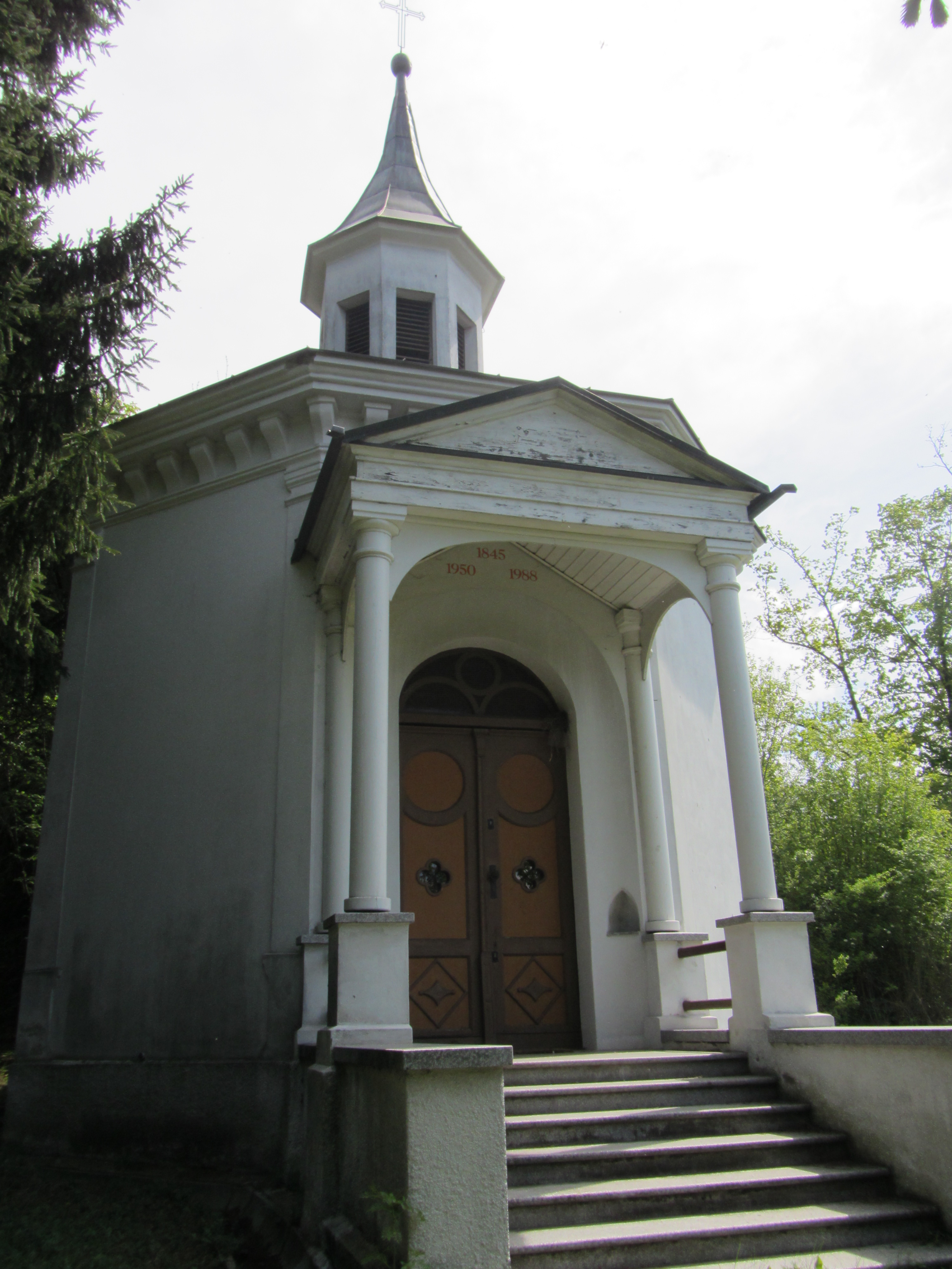 Kalvarienbergkapelle und Bildstöcke